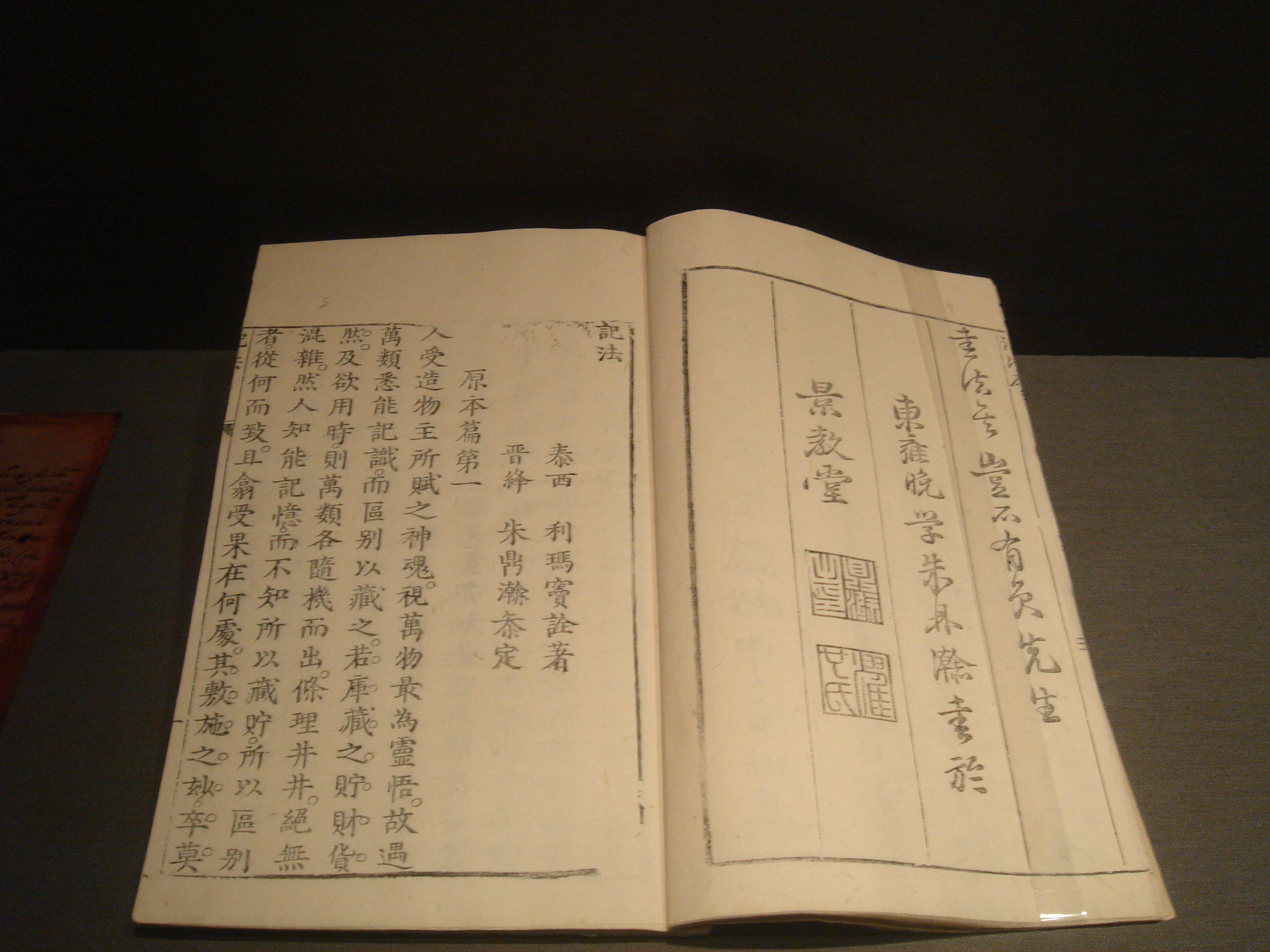 《西國記法》，利玛窦于1595—1596年撰写，范礼安修订后刊印，1625年后，印刷书，藏于罗马中央国立图书馆，摄于北京首都博物馆